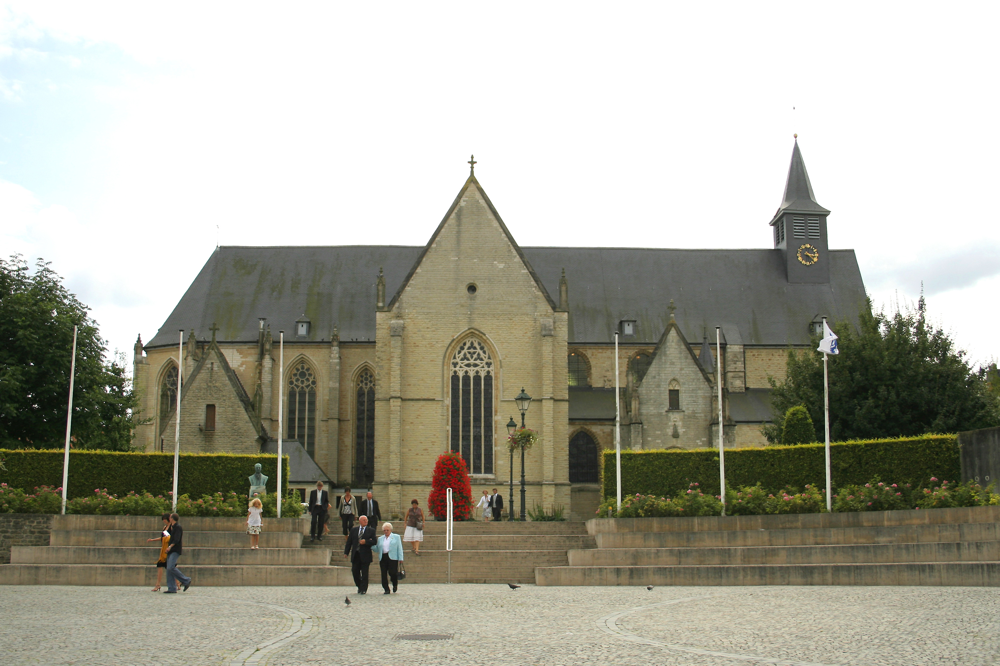 Tervueren, l'église Saint-Jean l'Évangéliste (XIIIe siècle)